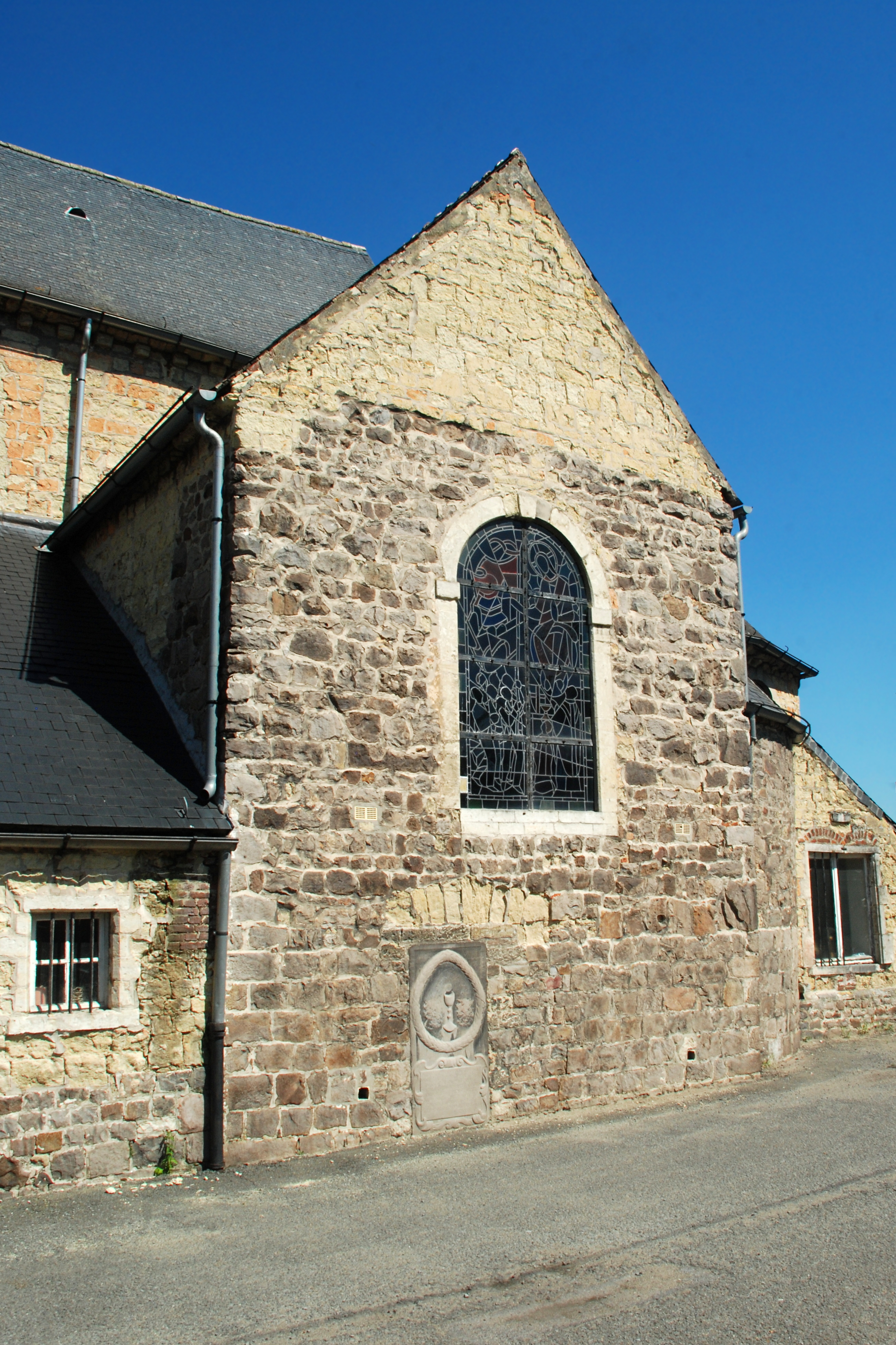 Belgique - Brabant wallon - Hélécine - Neerheylissem - Eglise Saint-Sulpice